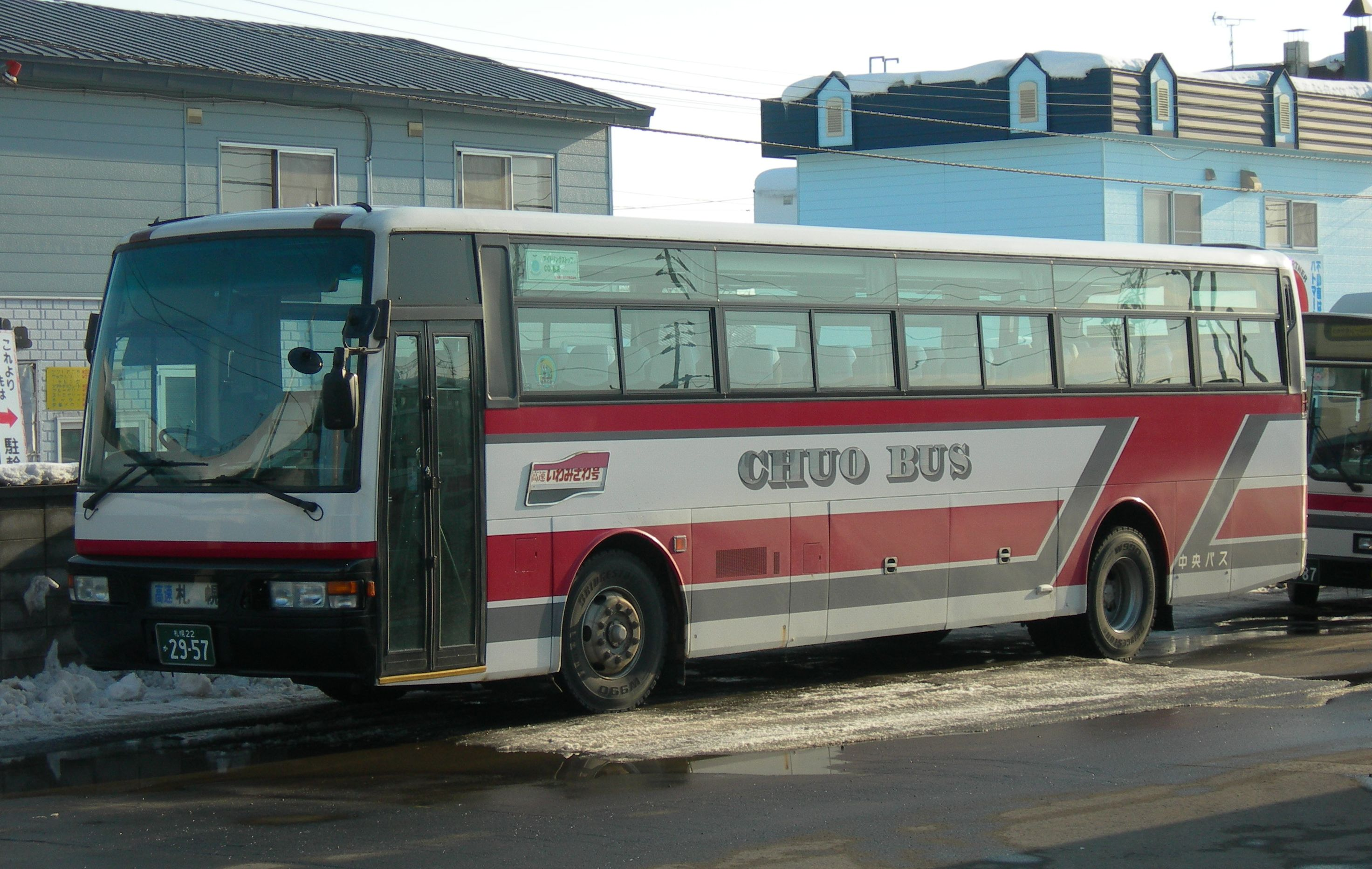 Hokkaido Chuo Bus car 北海道中央バス 高速いわみざわ号